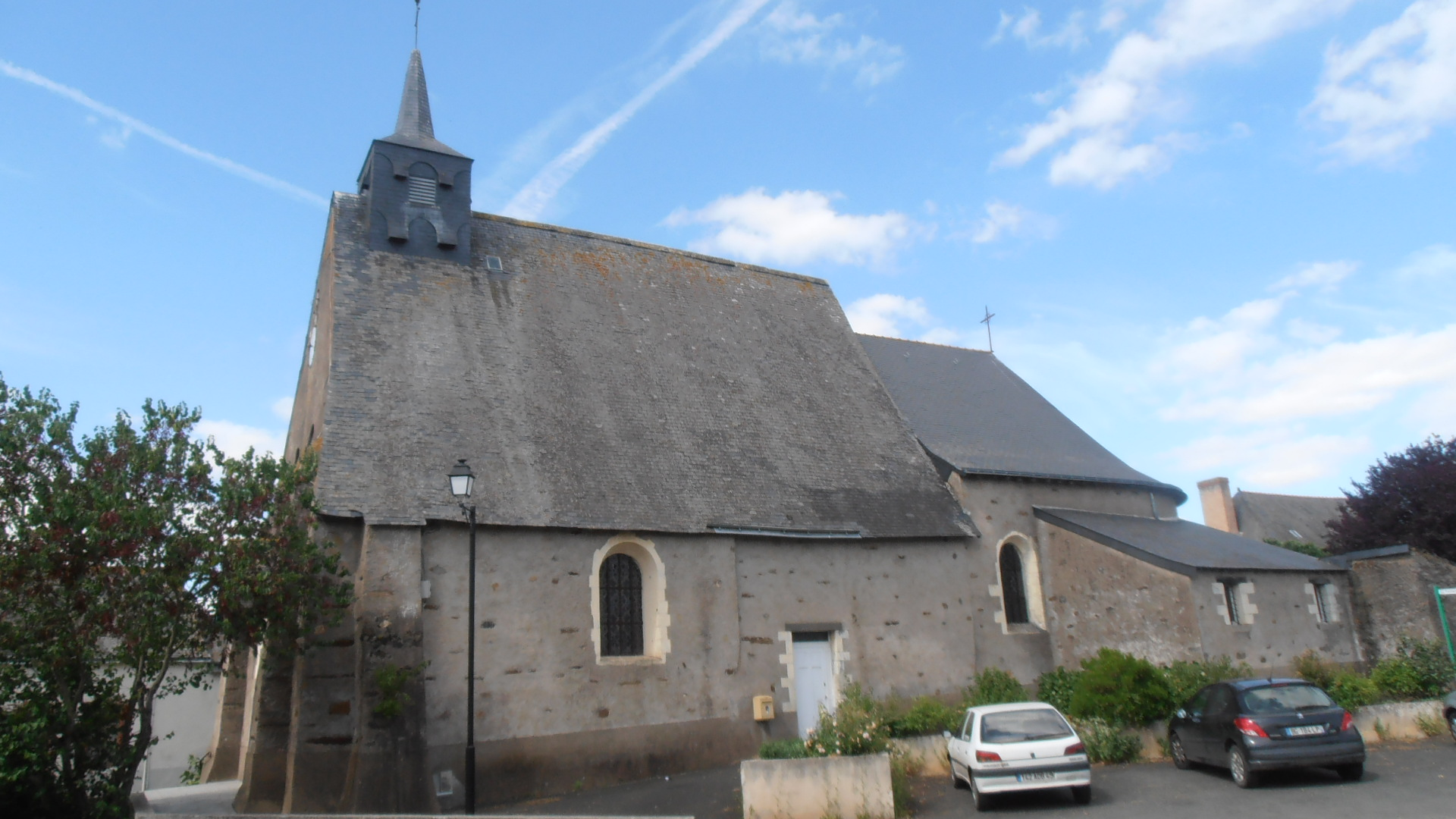 L'église de Saint-Sigismond (Maine-et-Loire, France).